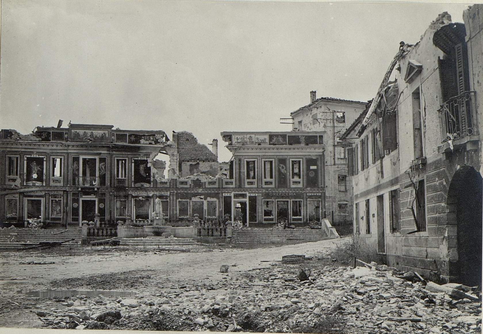 Valdobiadene.